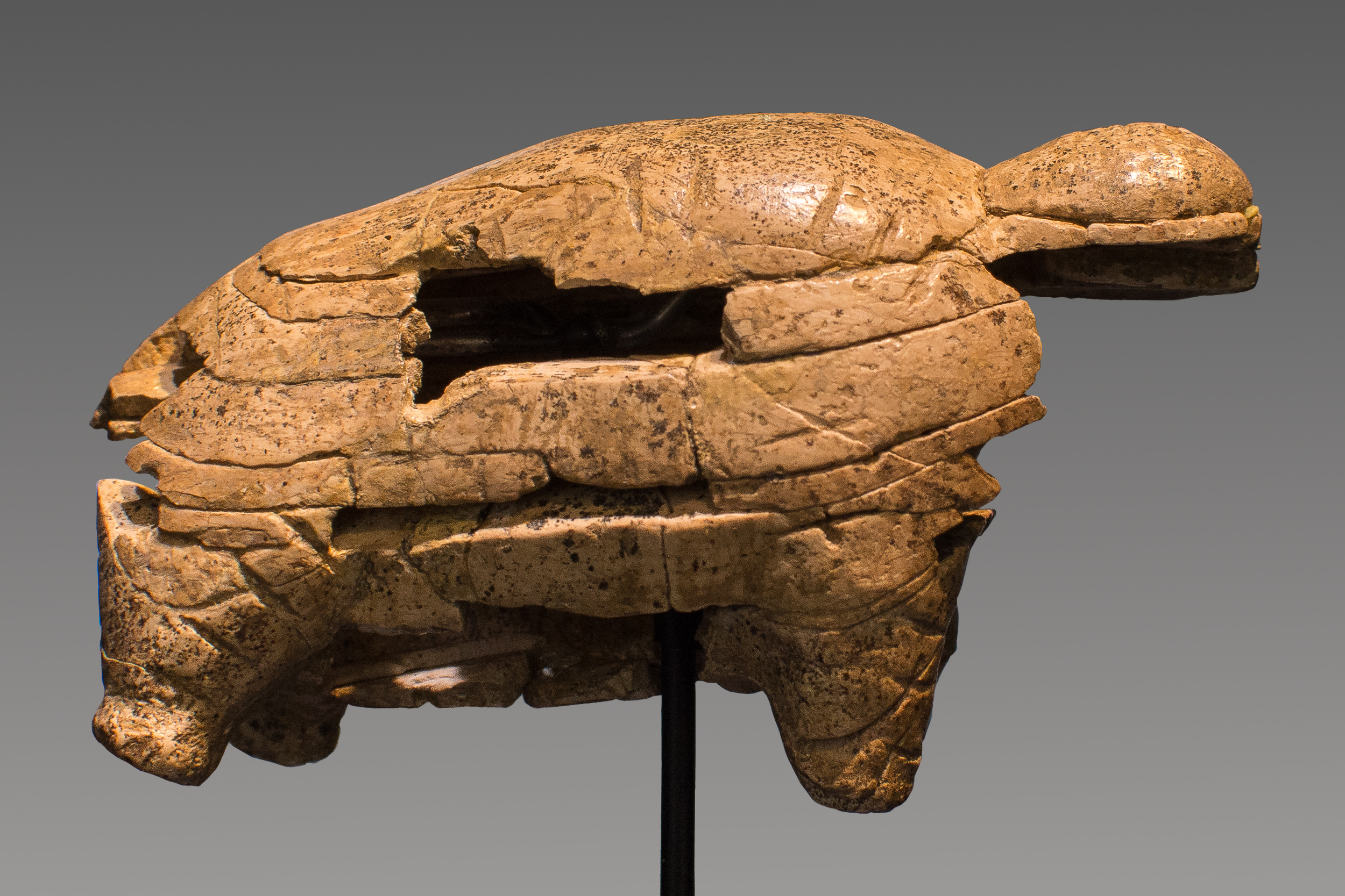 Mammutfigur aus dem Abri Geißenklösterle bei Blaubeuren, Horizont II a. Mammut-Elfenbein, Länge 67 mm, Höhe 38 mm, Dicke 29 mm.